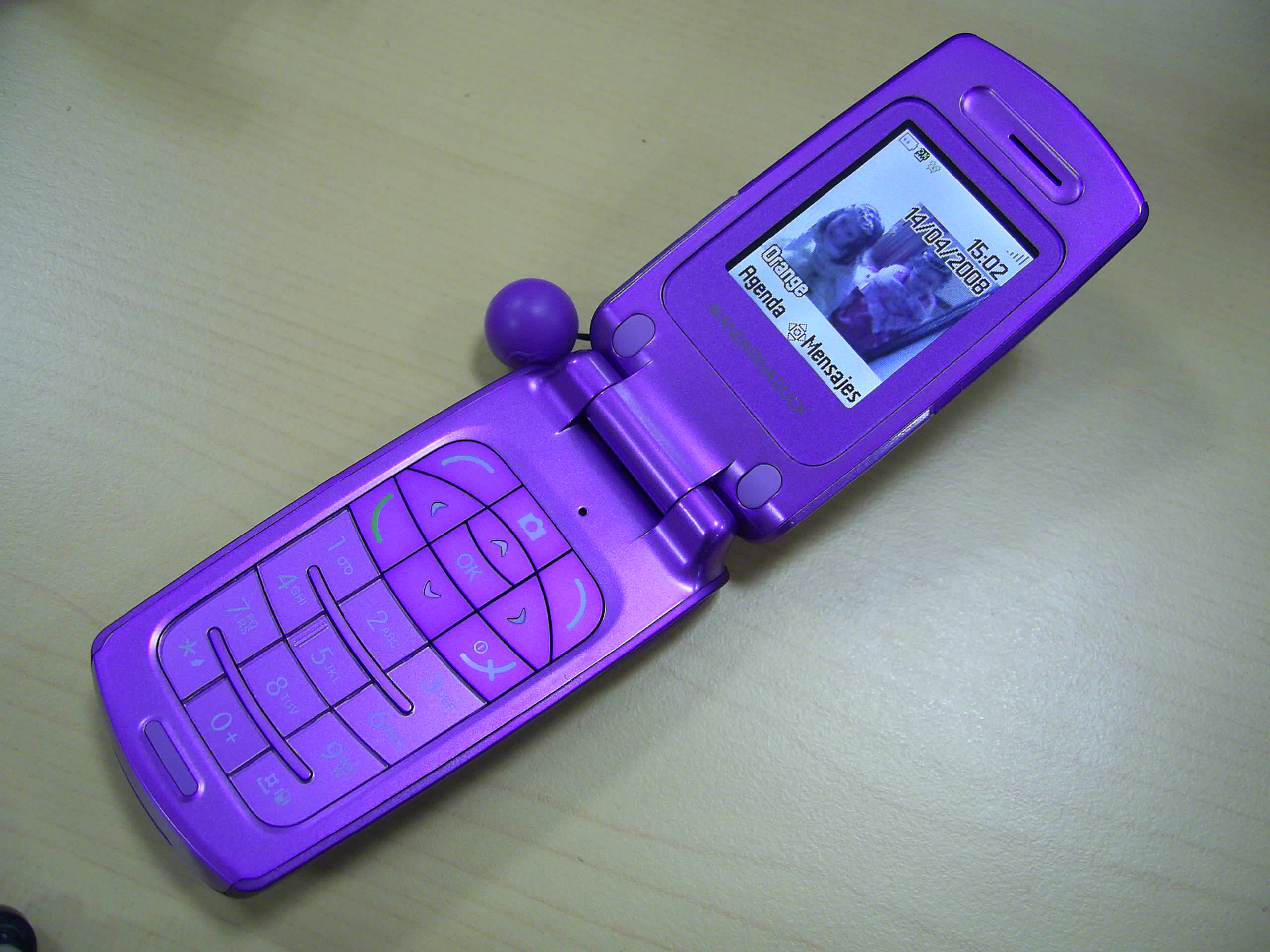 Teléfono móvil Alcatel Madarina Duck abierto